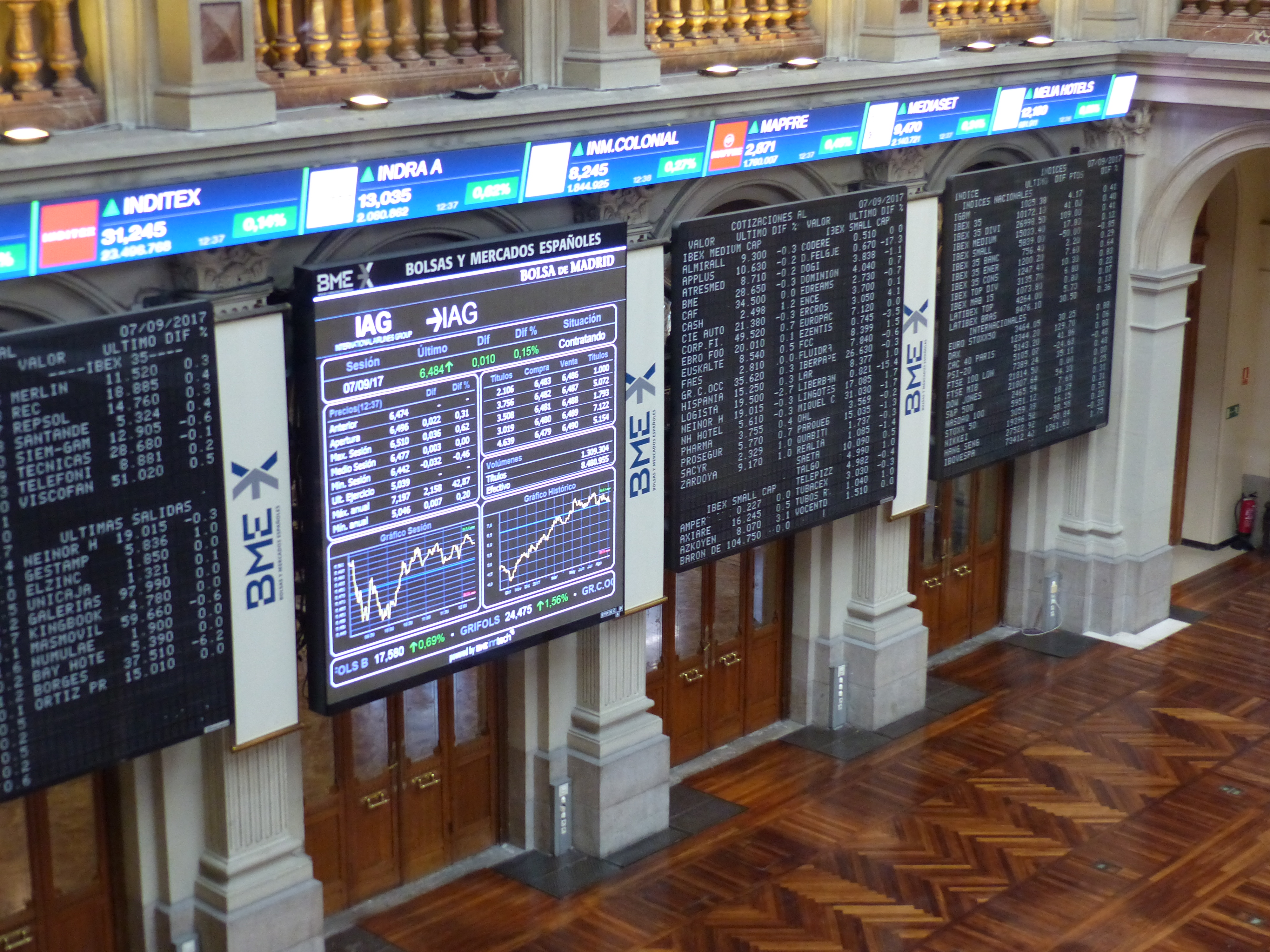 Interior del Palacio de la Bolsa, Madrid